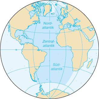 Die Karte stammt aus dem CIA World Factbook (dort als "zh-map.gif").